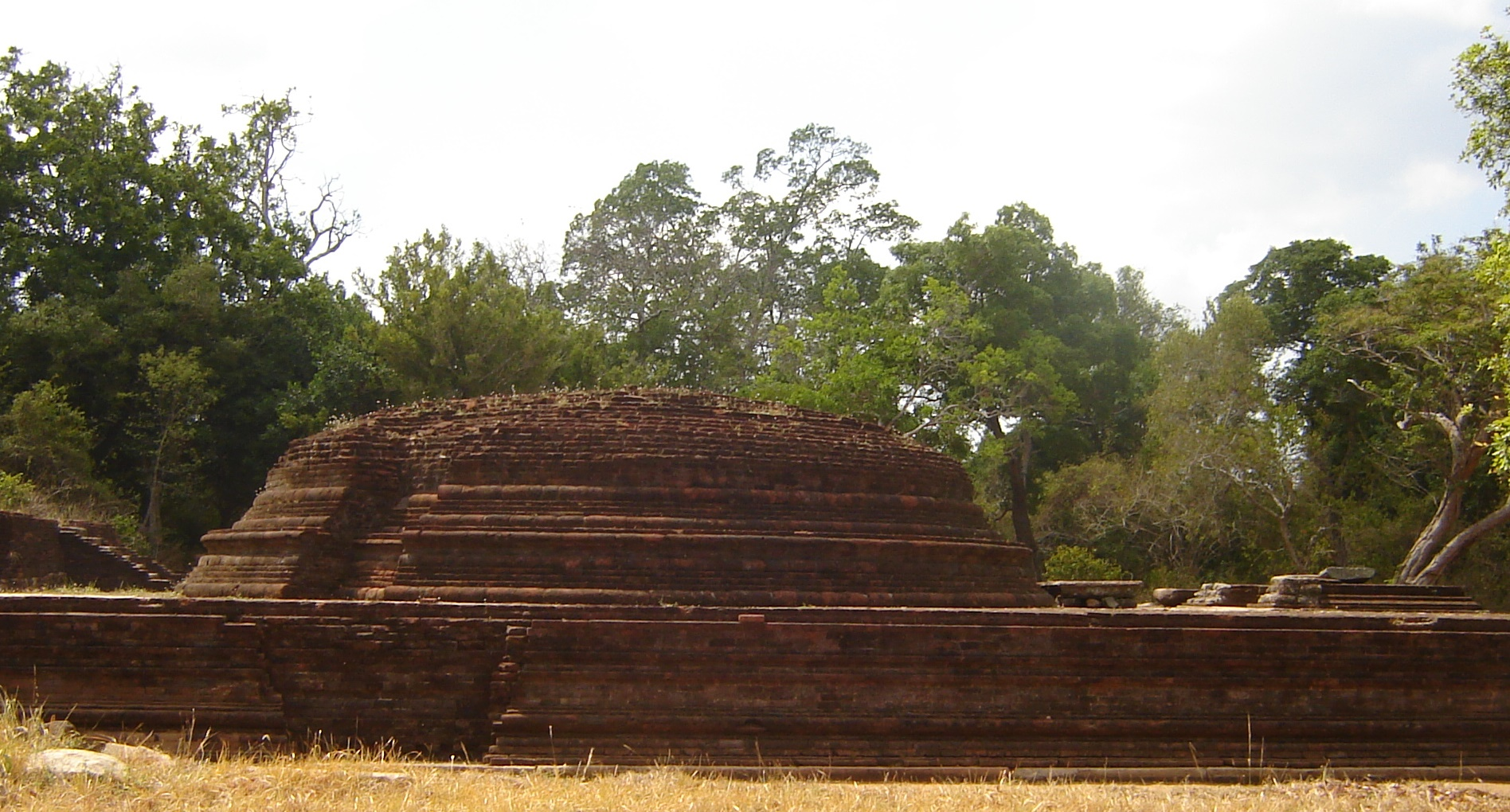 සිංහල: ත්‍රිකුණාමල පරිපාලන දිස්ත්‍රික්කයේ පිහිටාඇති වෙල්ගම්වෙහෙර දාගැබ